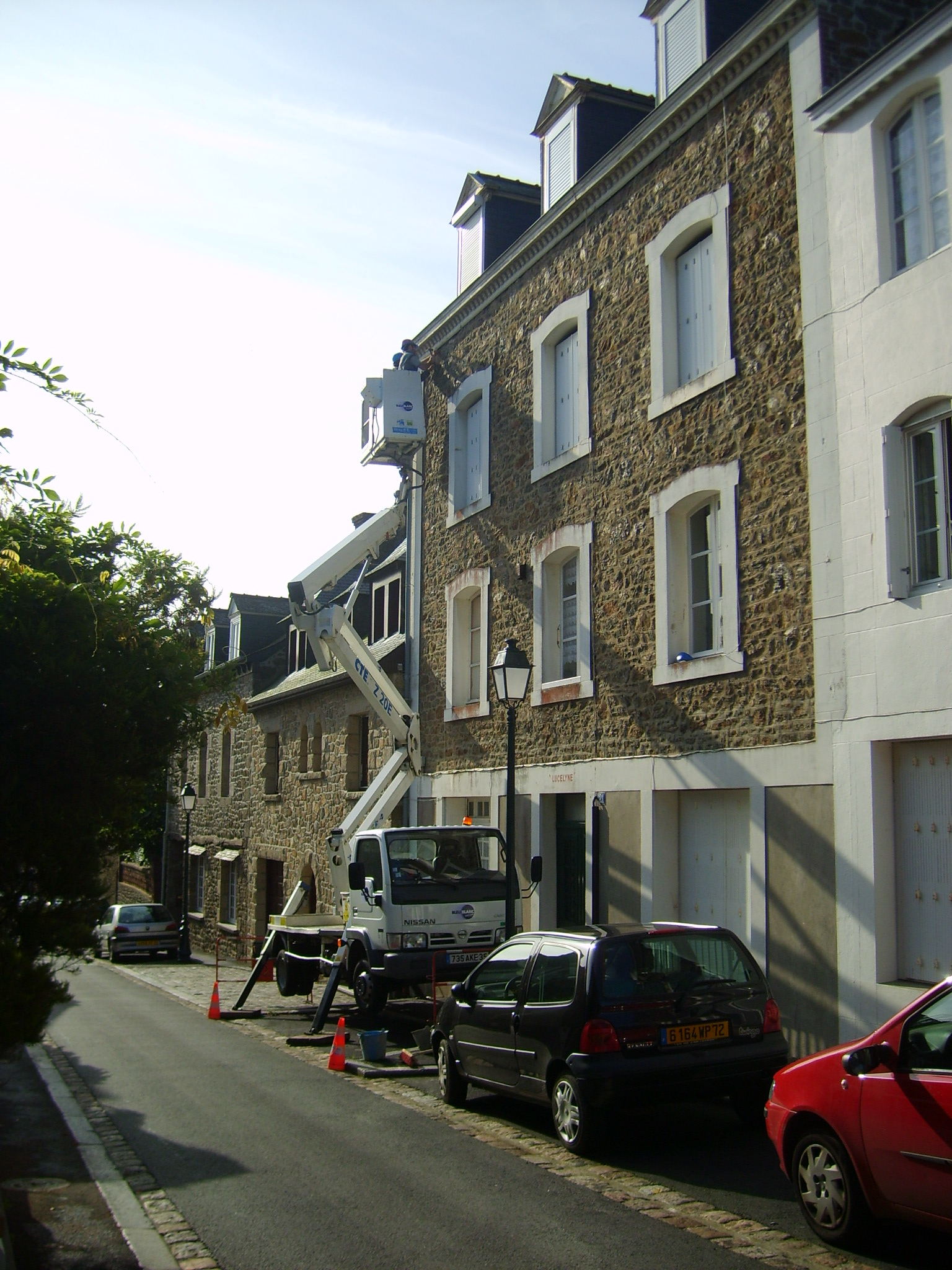 Sécurisation d'une façade d'immeuble grâce à une nacelle élévatrice